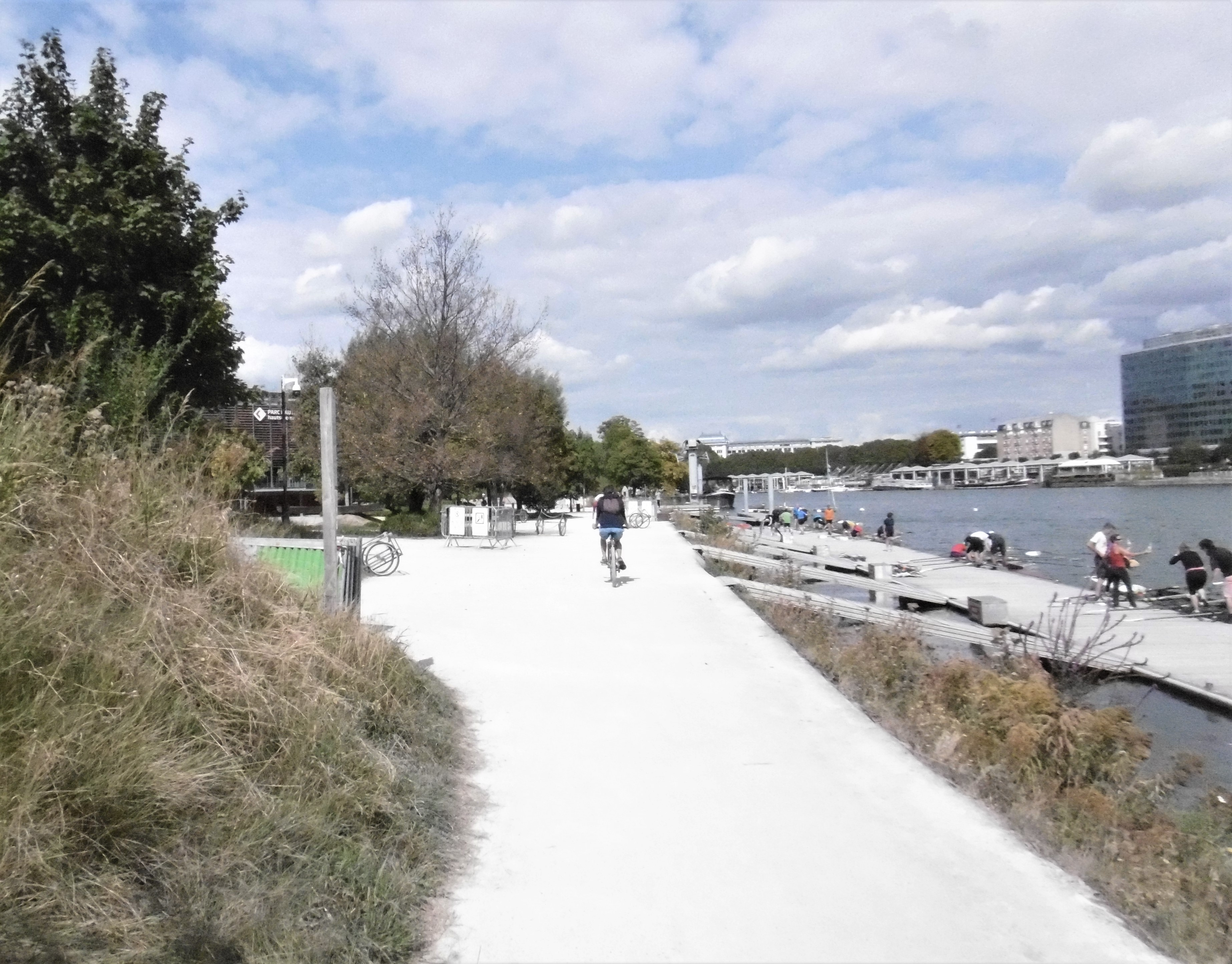 Sèvres entrée du parc nautique vue vers l'aval